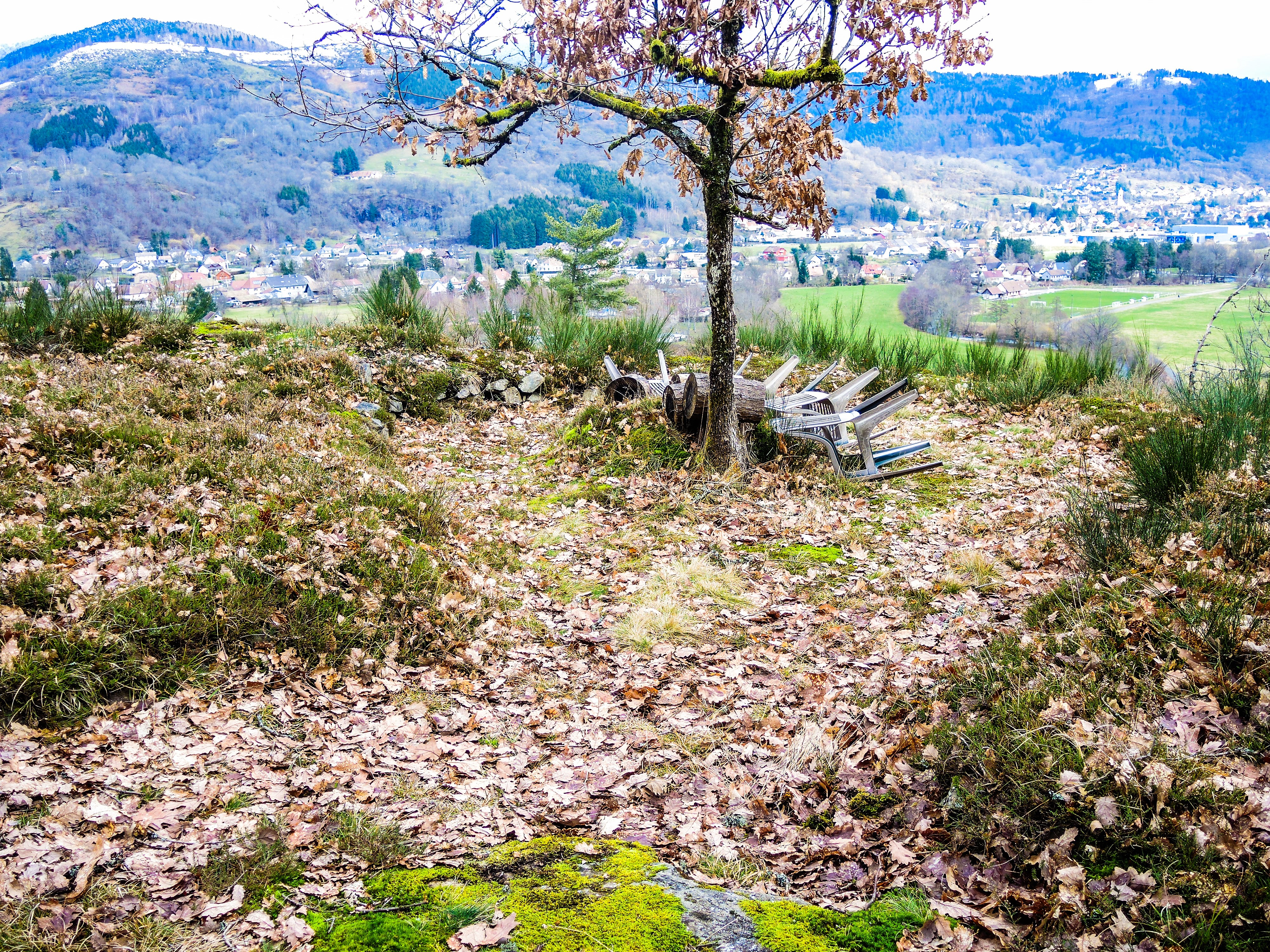 Emplacement de la tour sud, de l'ancien château du Stoerenburg. Belvédère remarquable sur Saint-Amarin et sur la vallée. Mitzach. Haut-Rhin.